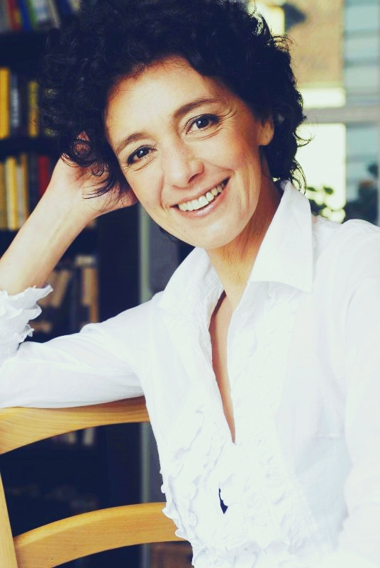 Francesca Vettori nel 1996